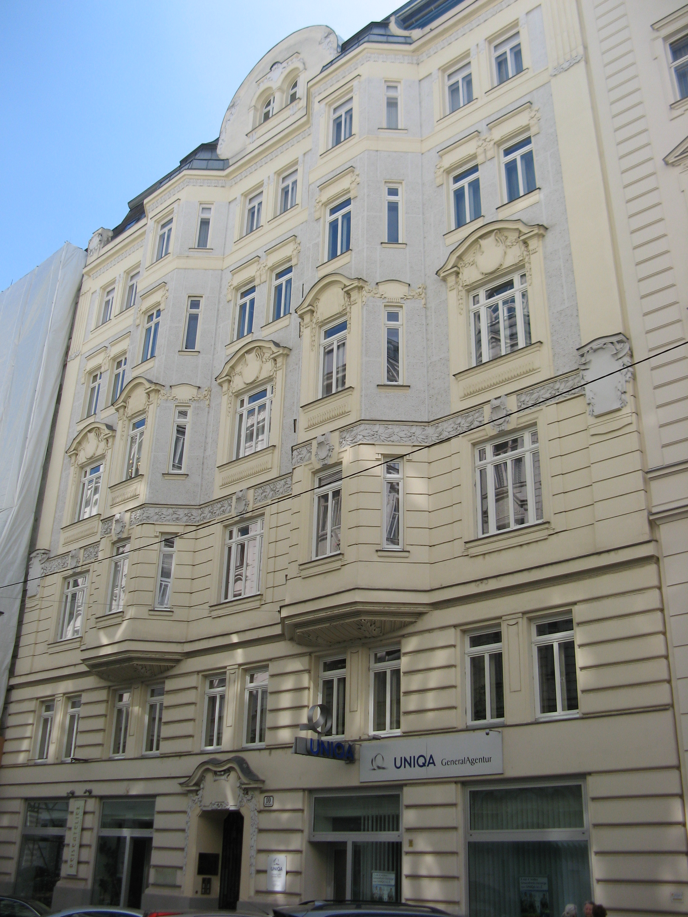 Haus Biberstraße Nr. 10 von Ludwig A. Fuchsik (1903-1904), Wien-Innere Stadt